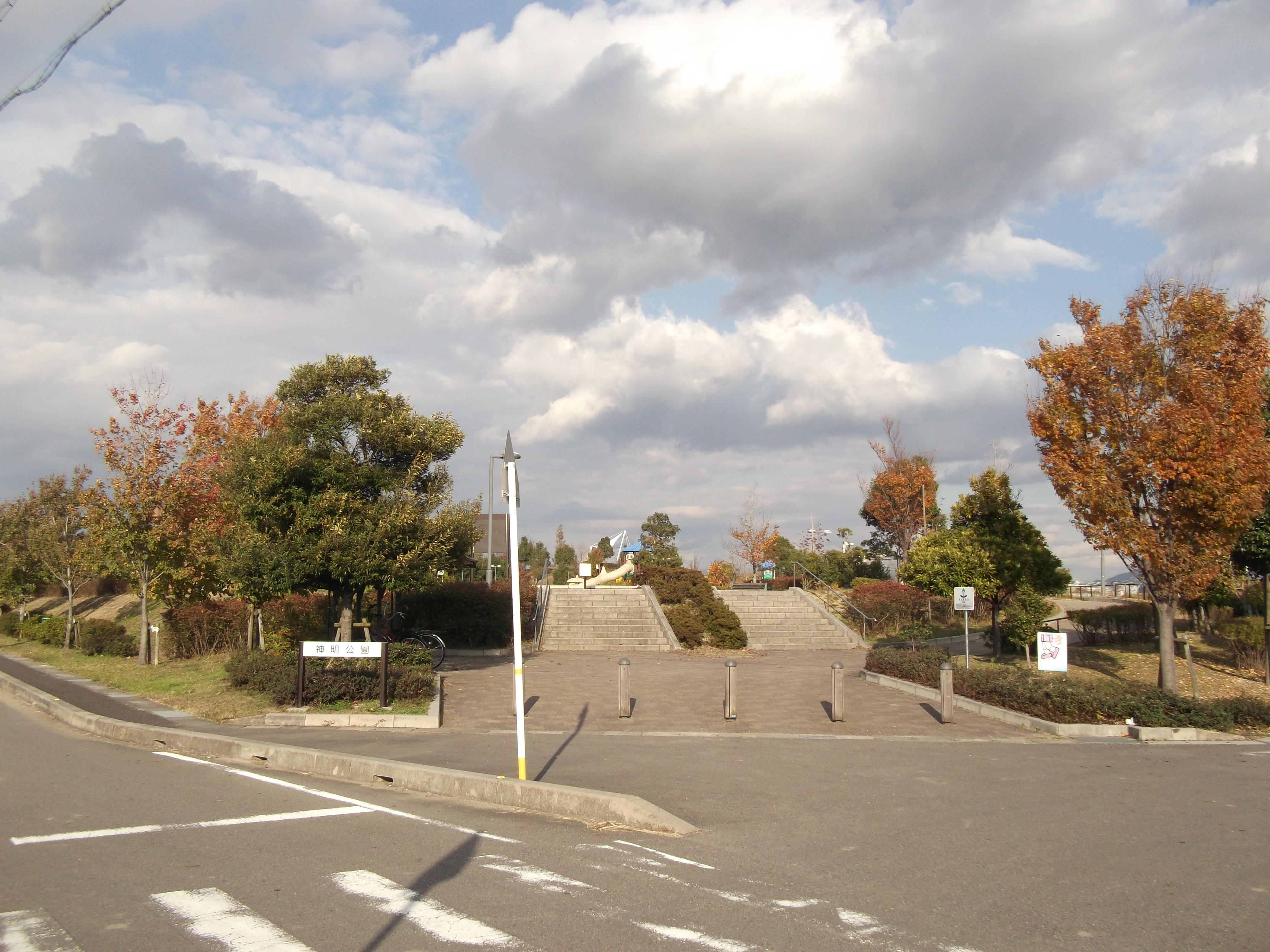 愛知県西春日井郡豊山町大字青山字神明の神明公園入口を南西より撮影